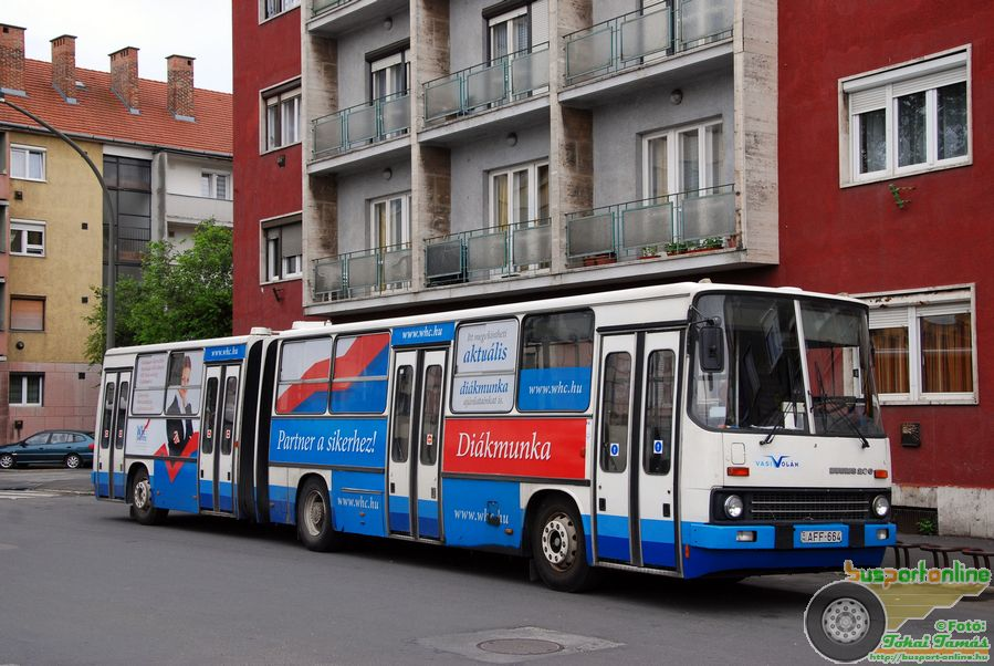 Ikarus 280-as busz, Szombathely, vasútállomás